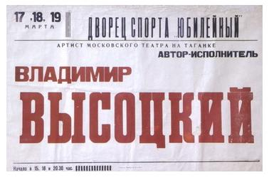 Владимир Высоцкий Афиша Ташкент март 1979 года